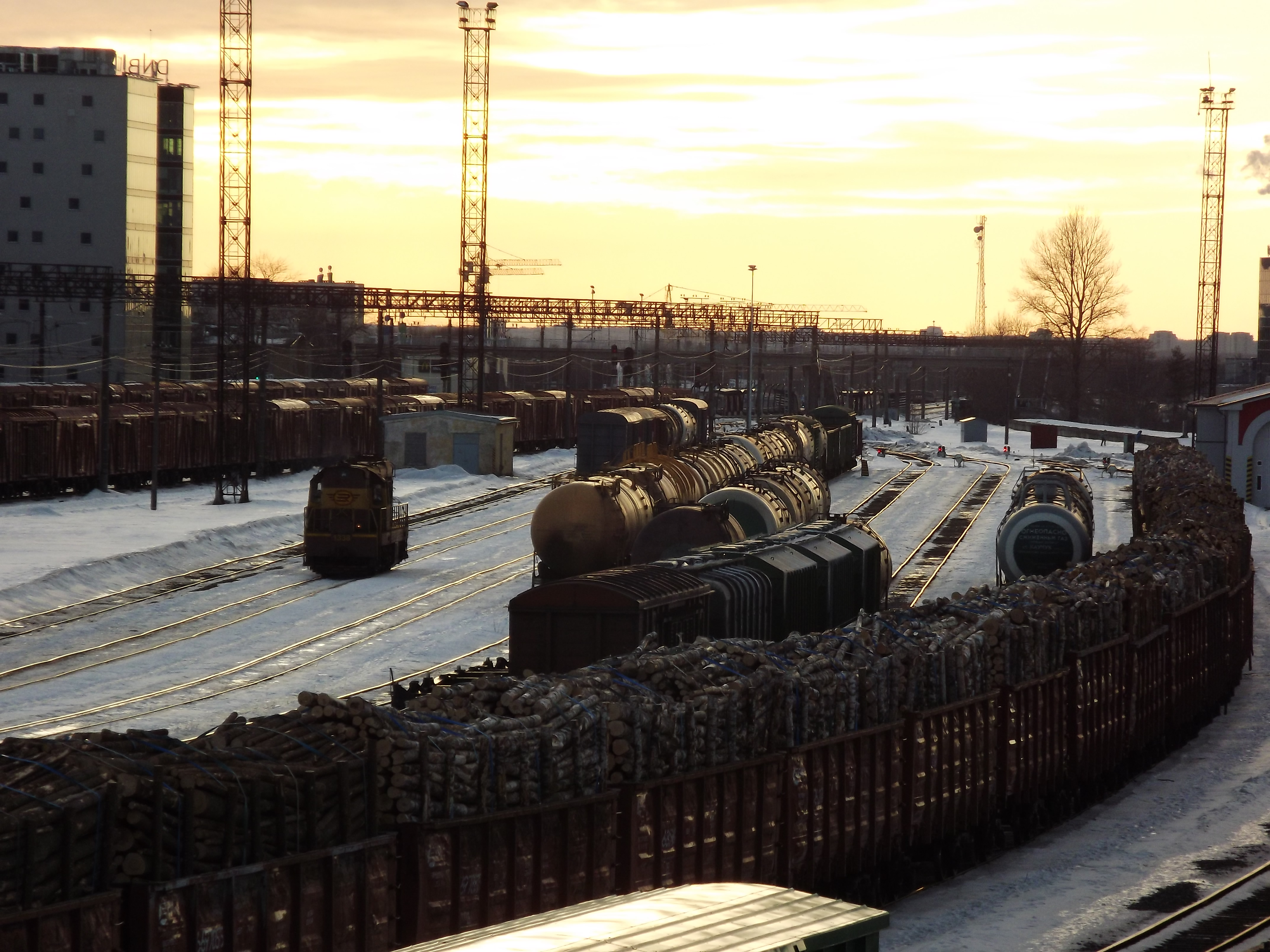 Ülemiste kaubajaam